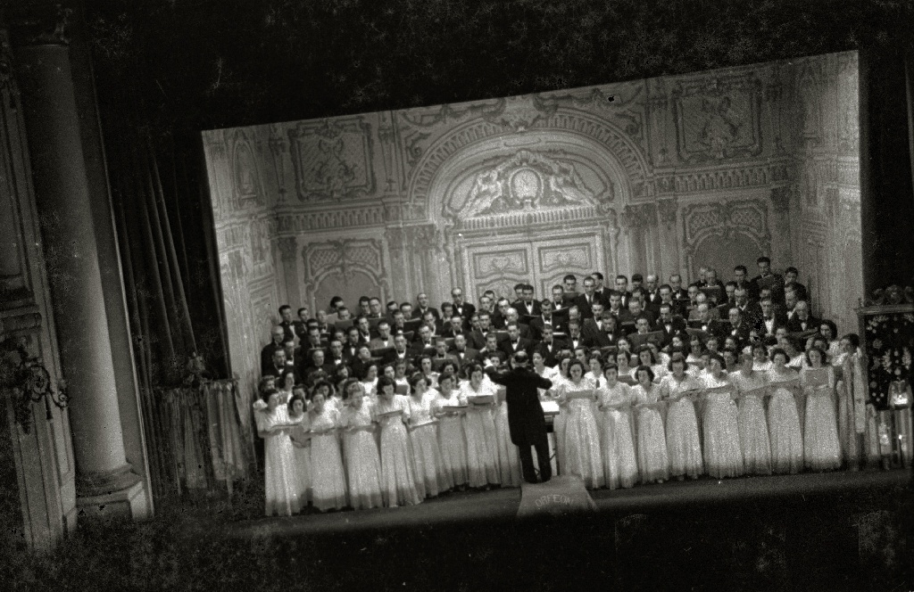 Título original: Actuación del Orfeón Donostiarra (1/2) Localización: Guipúzcoa